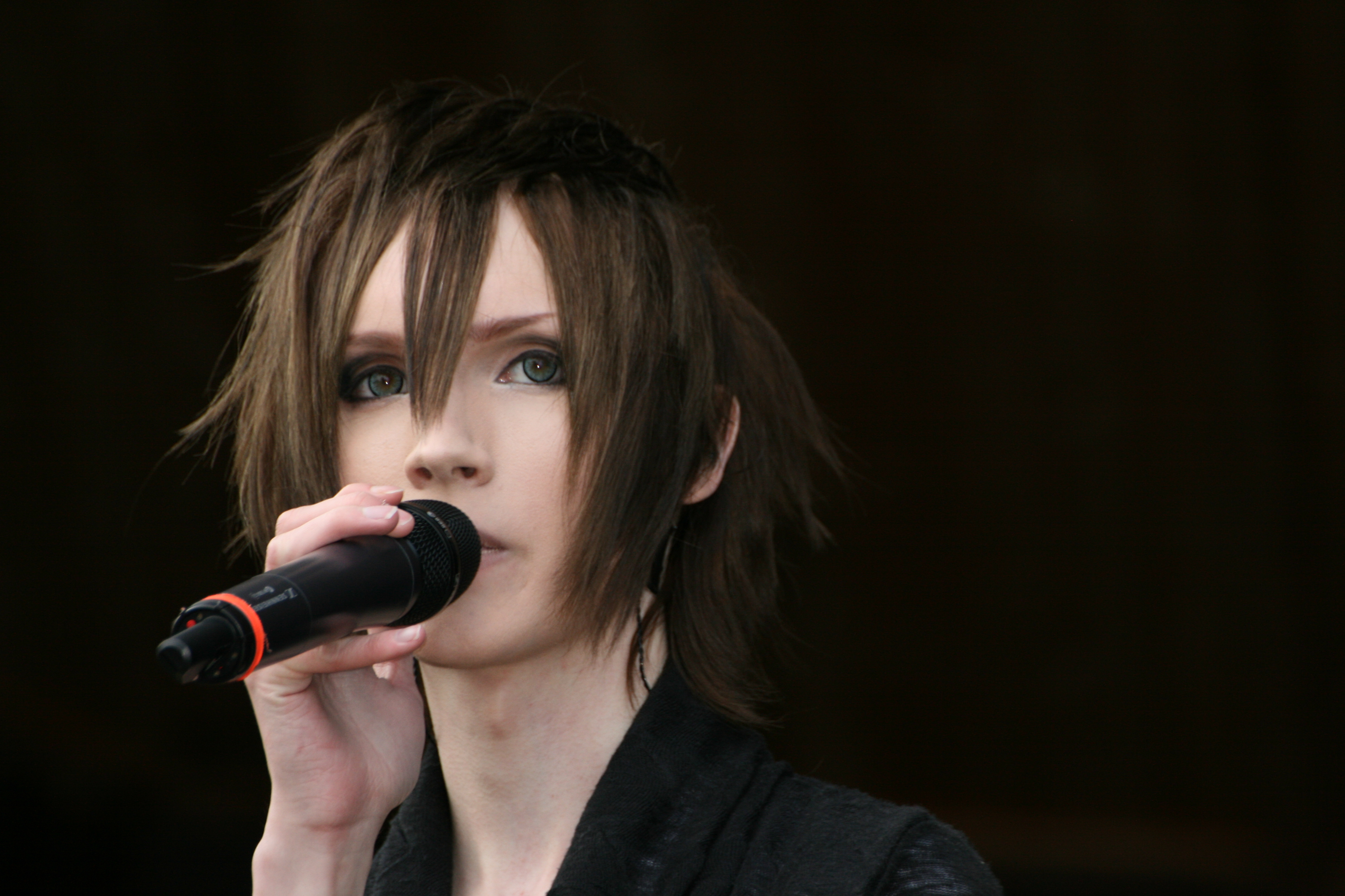 Yohio under sitt framträdande i Orsa